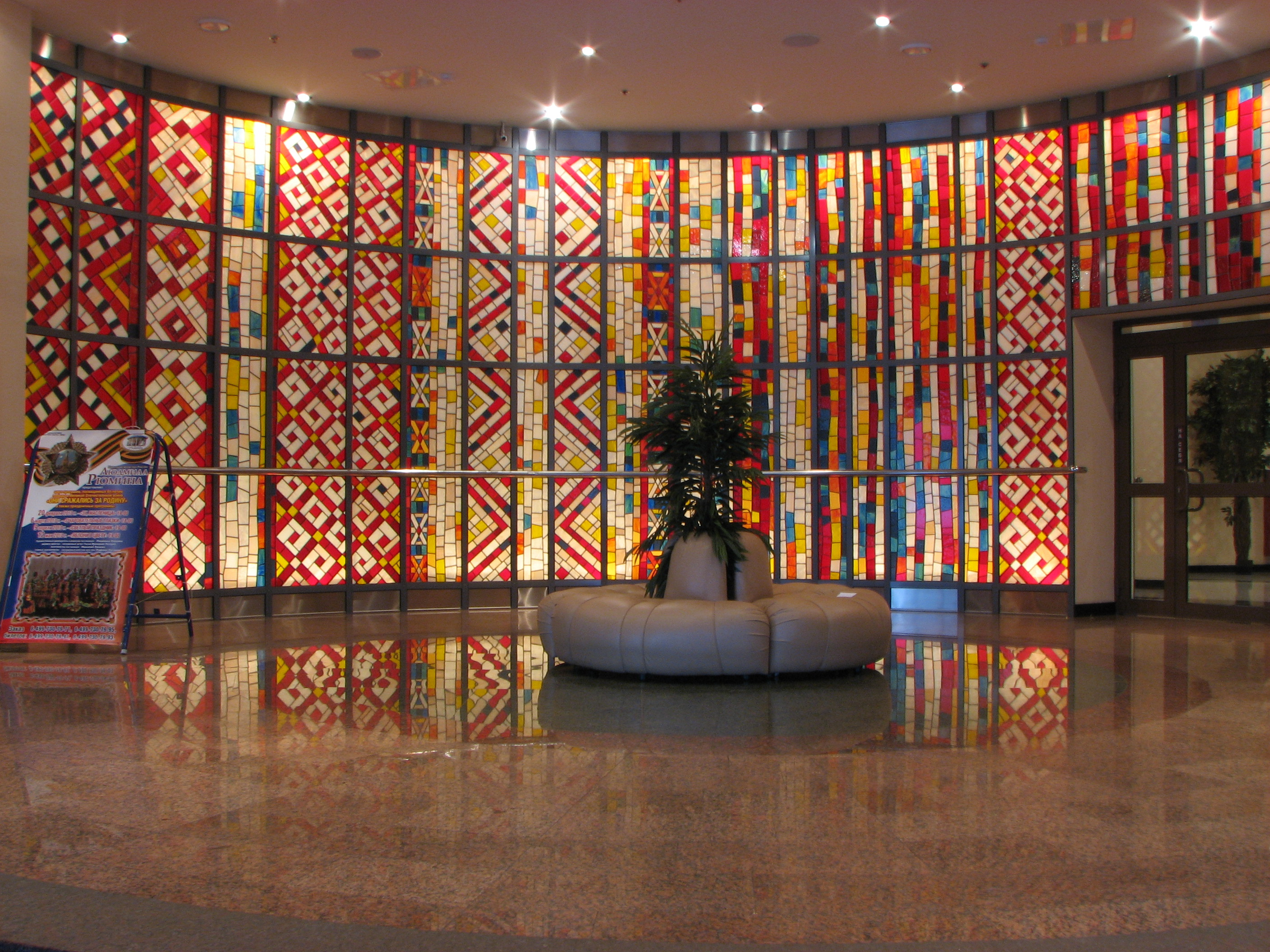 Малое фойе МКФЦ первый этаж